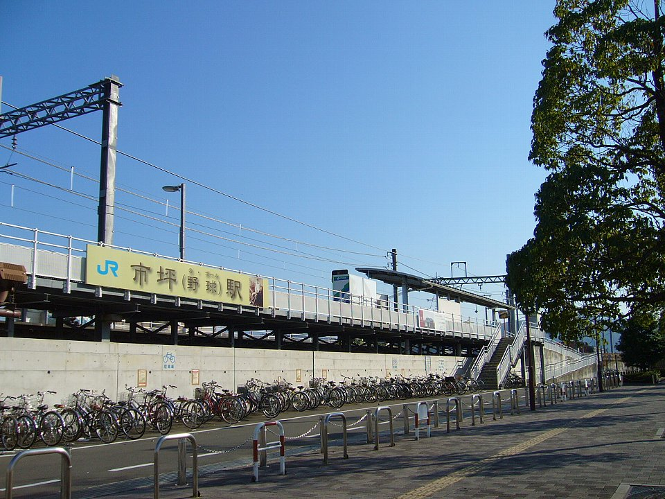 市坪駅外観